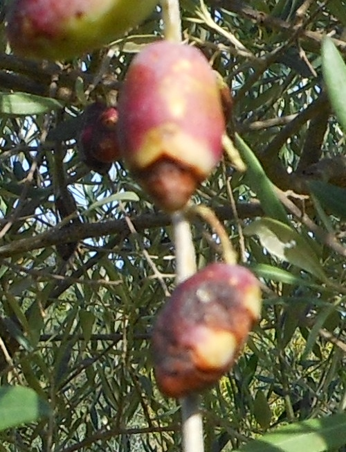 Olives picholine le 23/10/2014 dans mon verger, l'une d'elle présente l'attaque par le sommet de la drupe